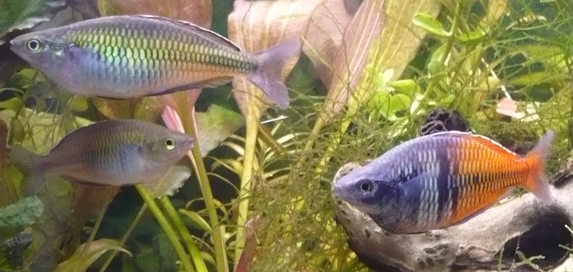 Regenbogenfische. (links 2 Weibchen; rechts ein Männchen)